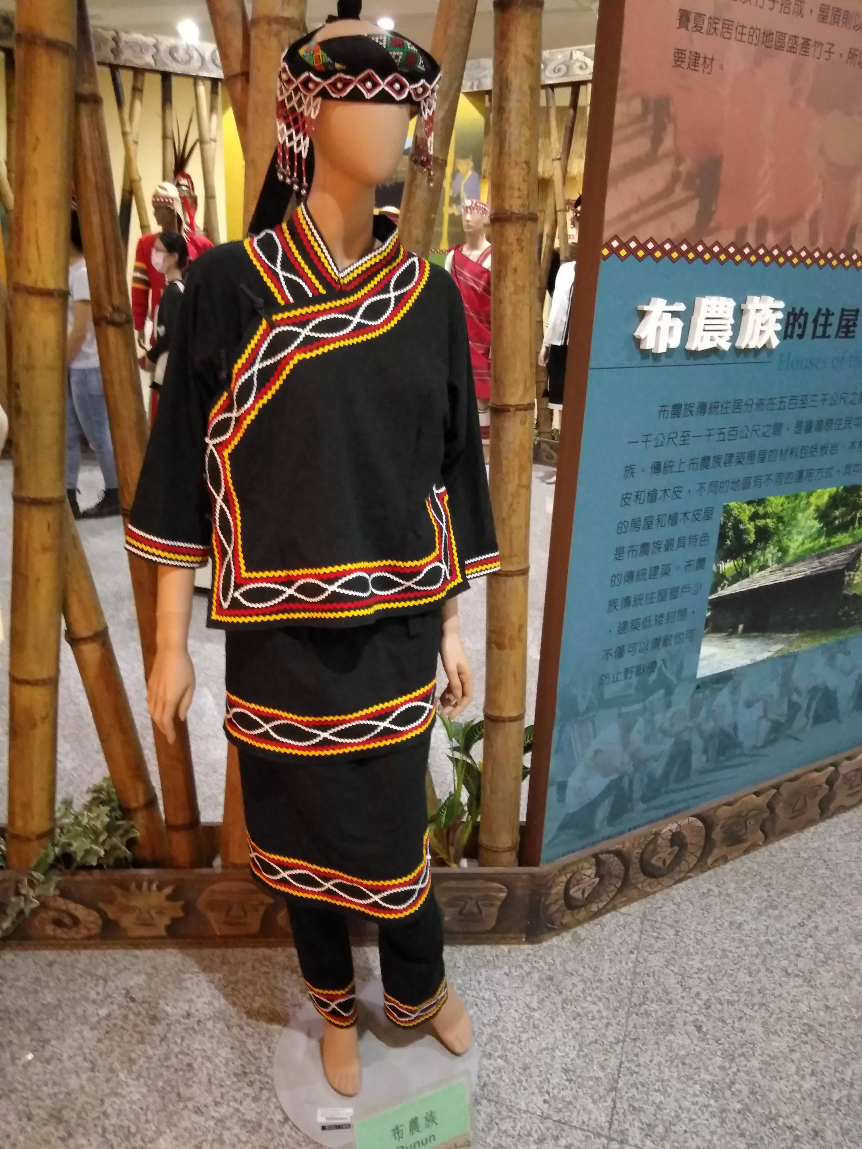 中文（台灣）: 台灣原住民服飾，布農族